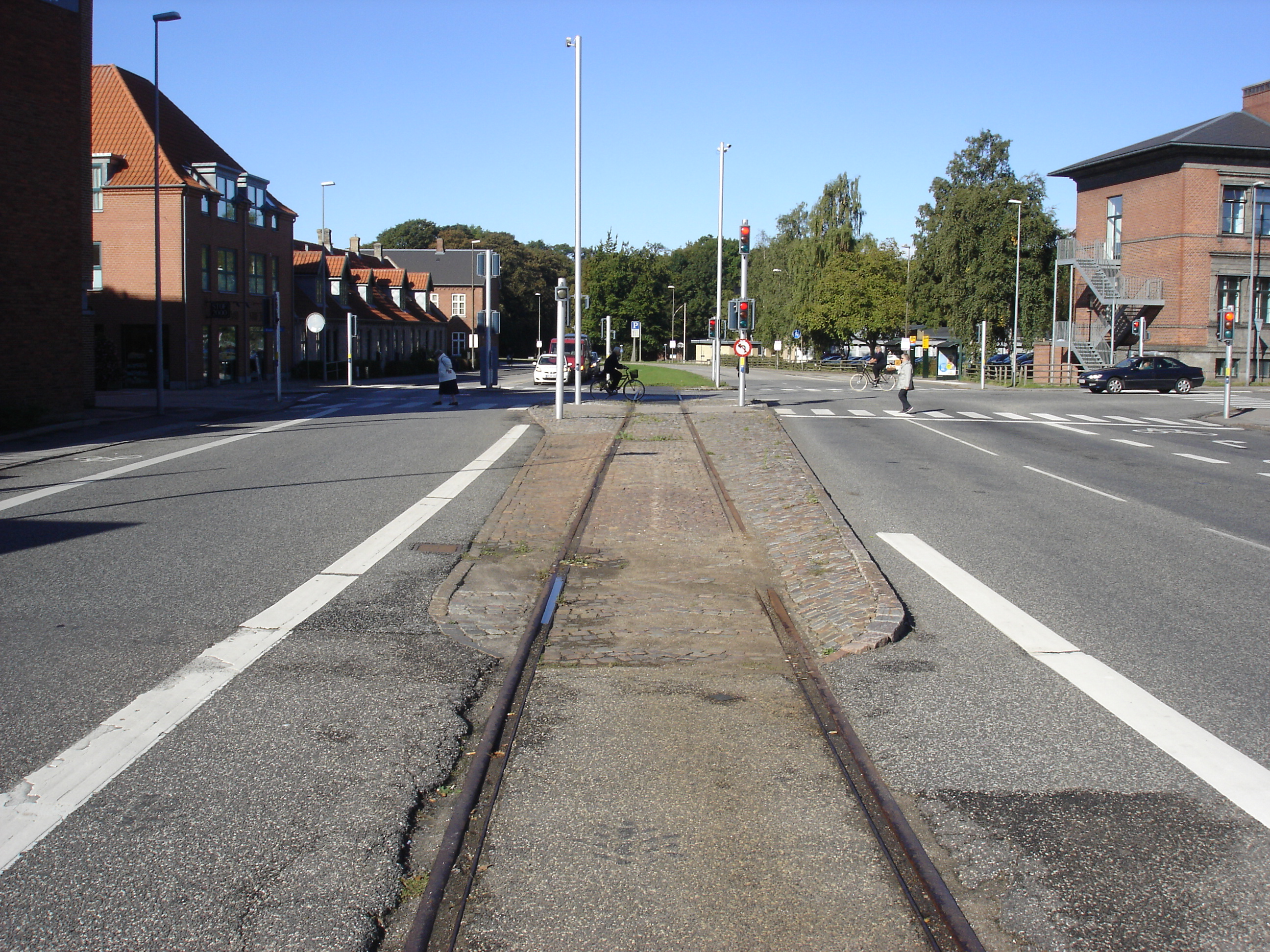 Næstved Havnebane går midt i Farimagsvej, det sidste stykke Ø for Ringstedgade i eget tracé. Videre gennem Rådmandshaven er skinnerne dækket af græs.